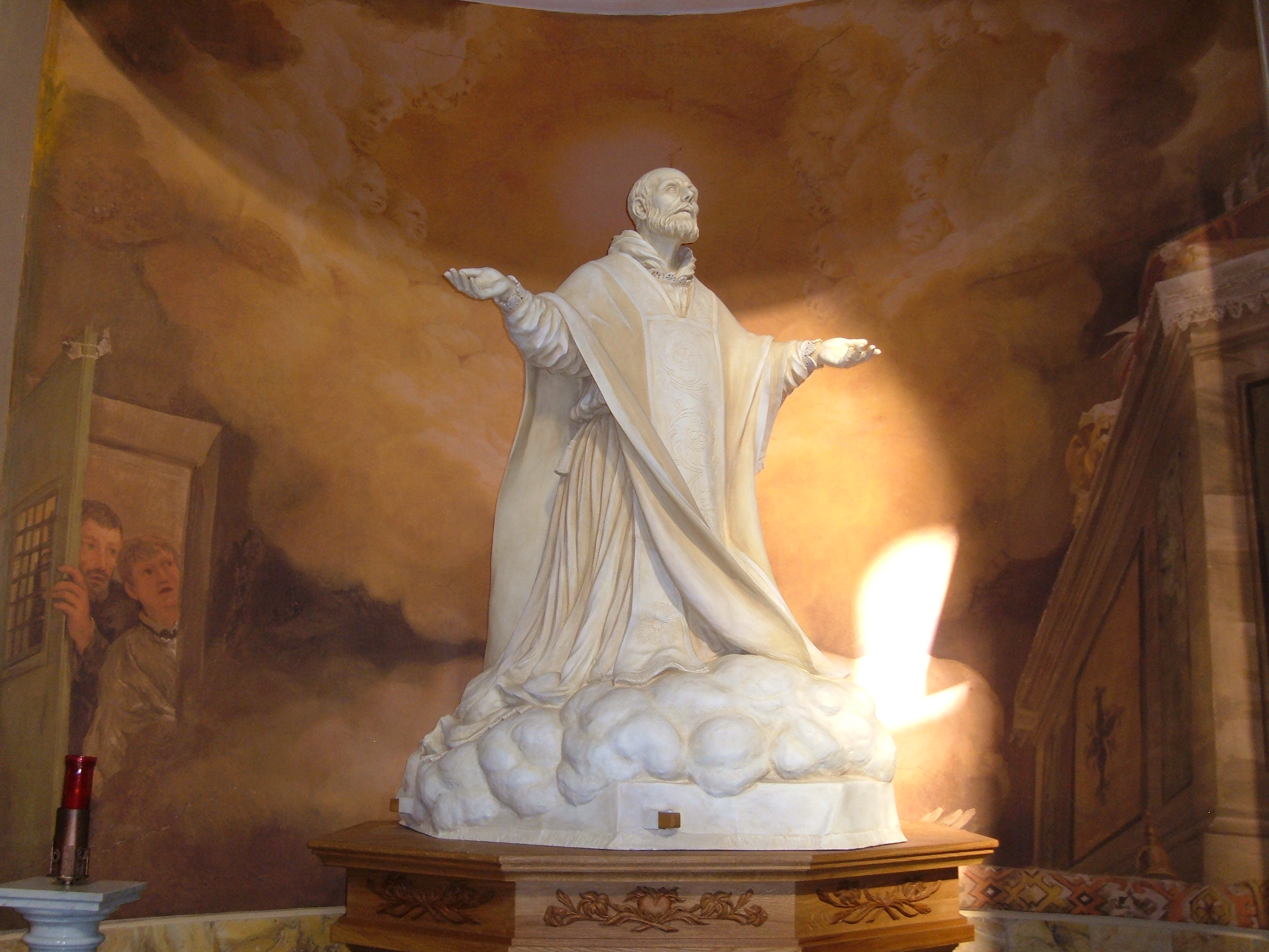 Interno della chiesa di san Filippo Neri in Eurosia a Roma, nel quartiere Ostiense, in via delle Sette Chiese. Statua di San Filippo Neri.